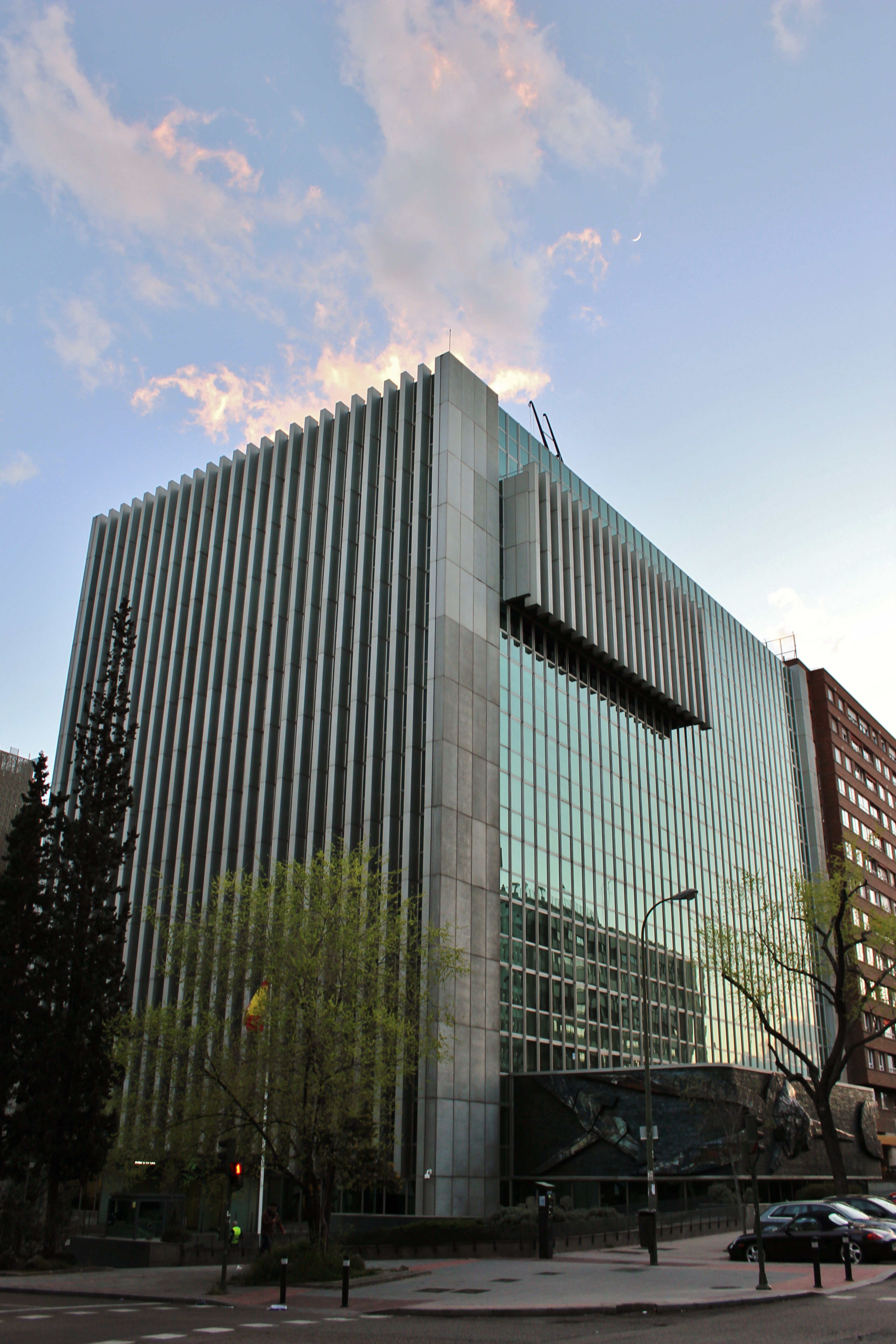 Capitán Haya, edificio, Madrid.